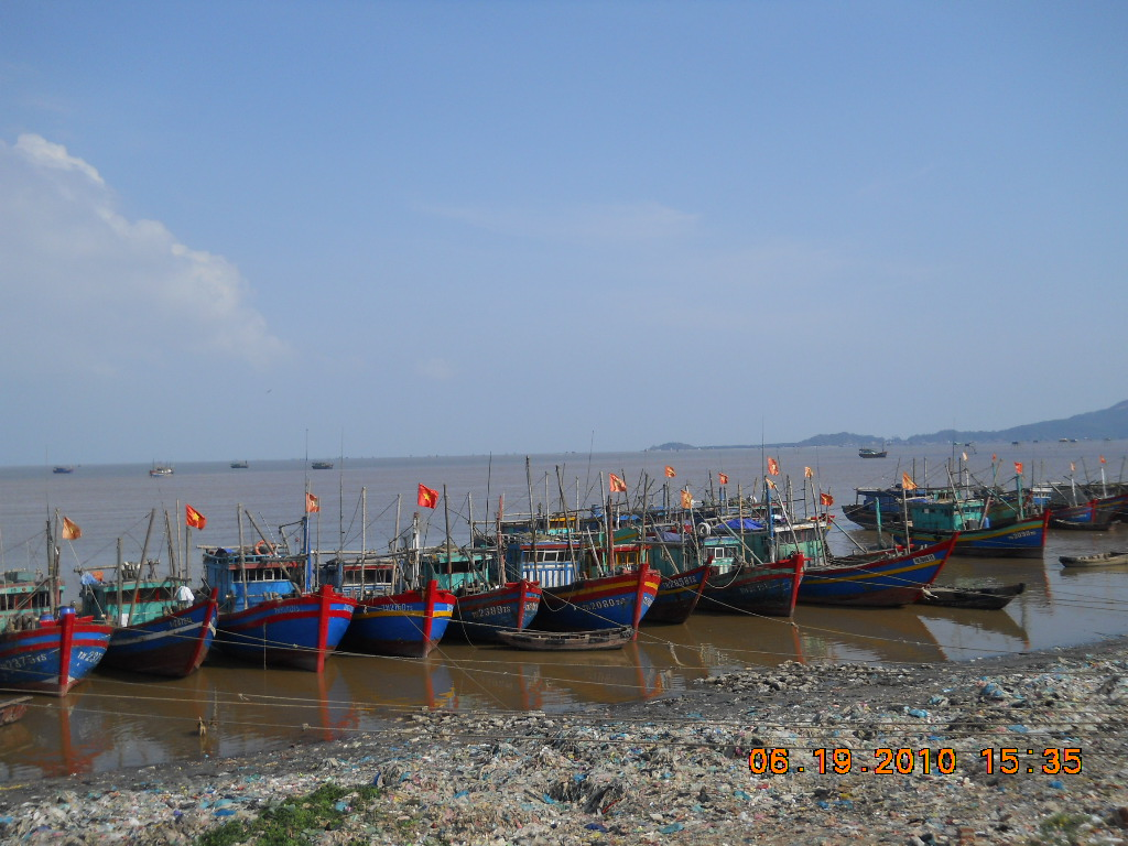 bờ biển Diêm Phố, Ngư Lộc, Hậu Lộc, Thanh Hóa